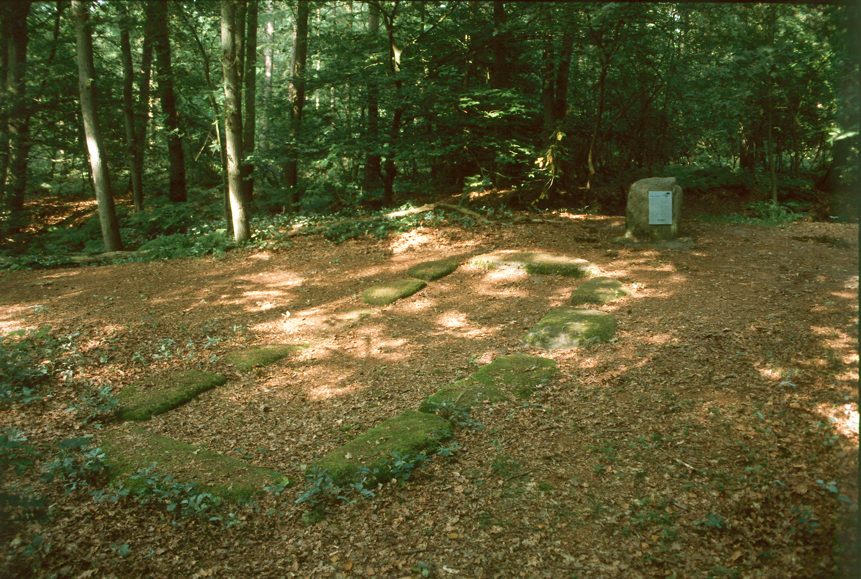 Hunebed Rijs Steenkist